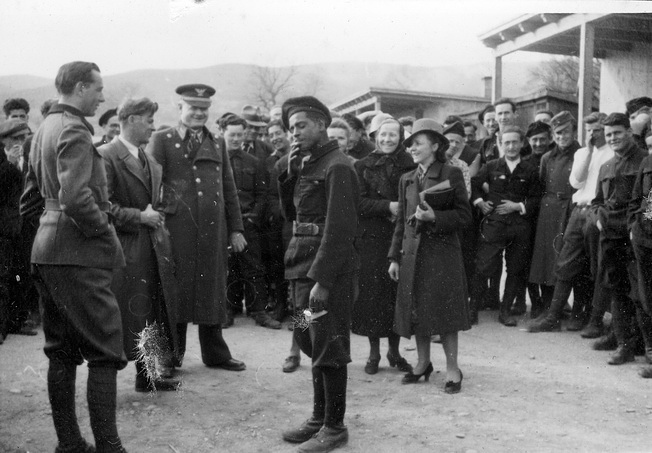 הגדוד השישי, שיאסטי פרפור Siesty Prapor יחידת עבודה במסגרת הצבא הסלובקי עד קייץ 1943. המשרתים ביחידה זו היו מוגנים בפני גירוש לפולין. מרבית המגויסים השתתפו במרד הסלובקי. התצלומים בזכות היותו של רפי צלם רשמי של הגדוד - רפי בנשלום